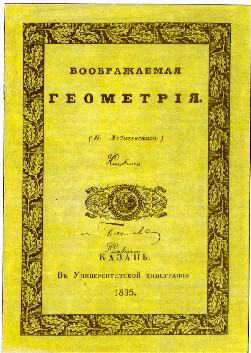 Титульный лист труда «Воображаемая геометрия», 1837, Николай Иванович Лобачевский (1792-1856)